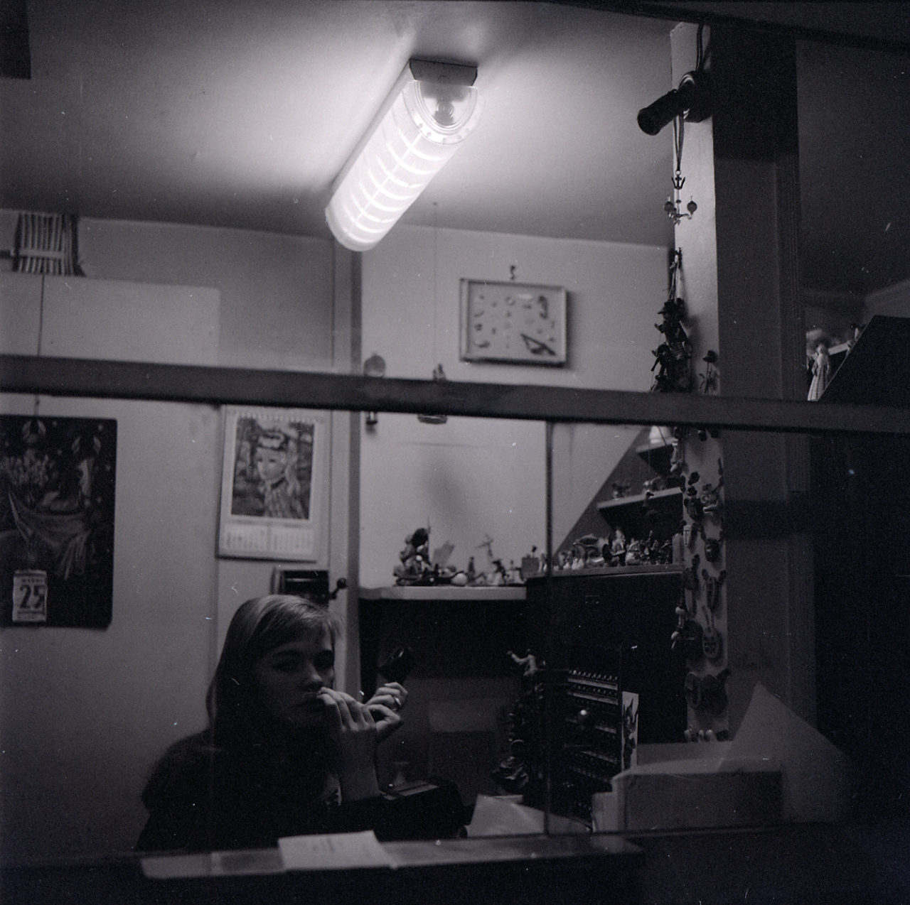 Serie fotografica : Paris, 1967 / Paolo Monti. - Buste: 18, Fototipi: 18 : Negativo b/n, gelatina bromuro d'argento/ pellicola ; 6x6. - ((Serie costituita da 21 buste di carta, tenute insieme da una graffetta, identificate con i nn.: R10934, R10935, R10936, R10937, R10938, R10939, R10940, R10941, R10942, R10943, R10944, R10945, R10946, R10947, R10948, R10949, R10950, R1951. - Sulla busta R11089: "Parigi. N.R.F."